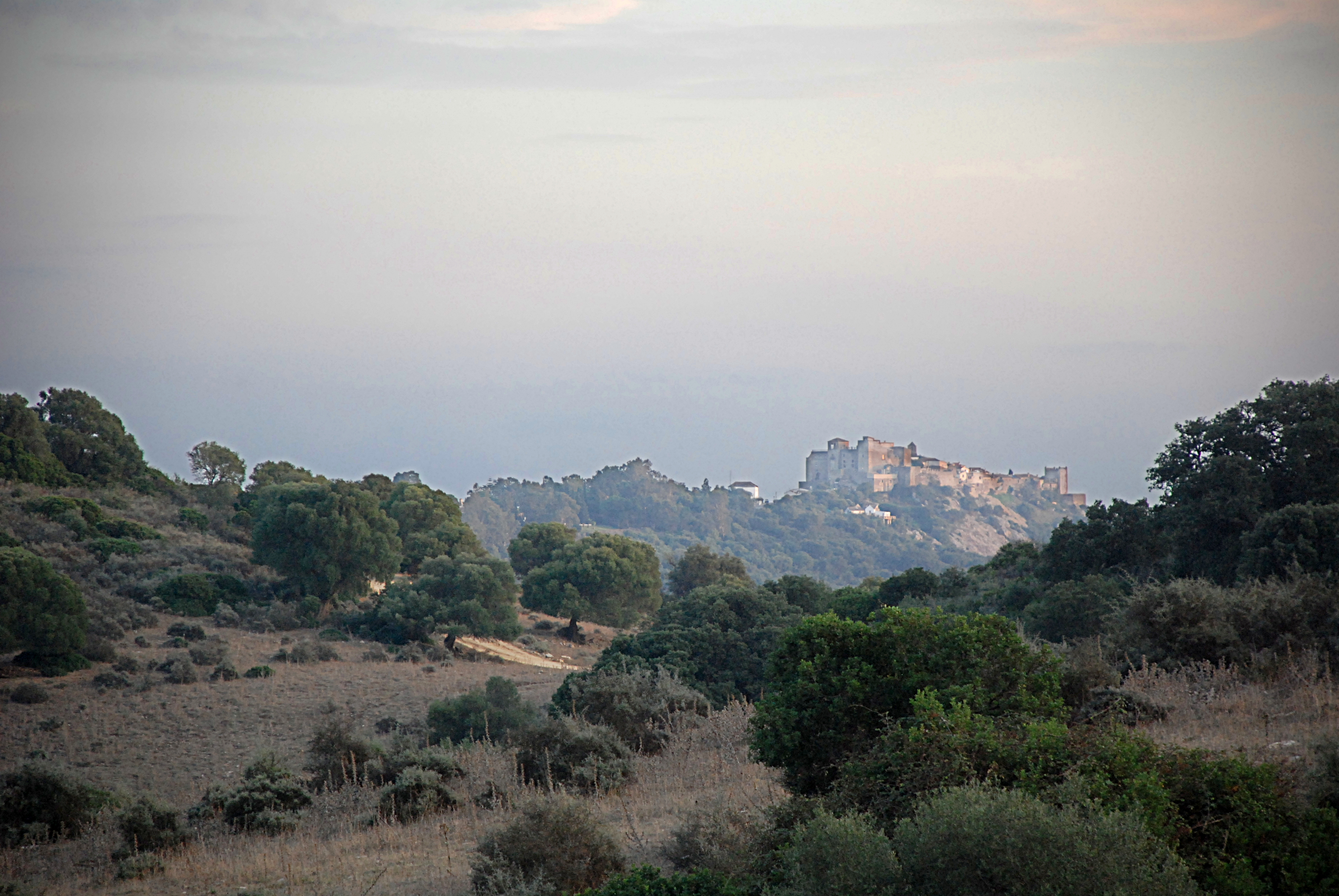 Castellar de la Frontera al atardecer